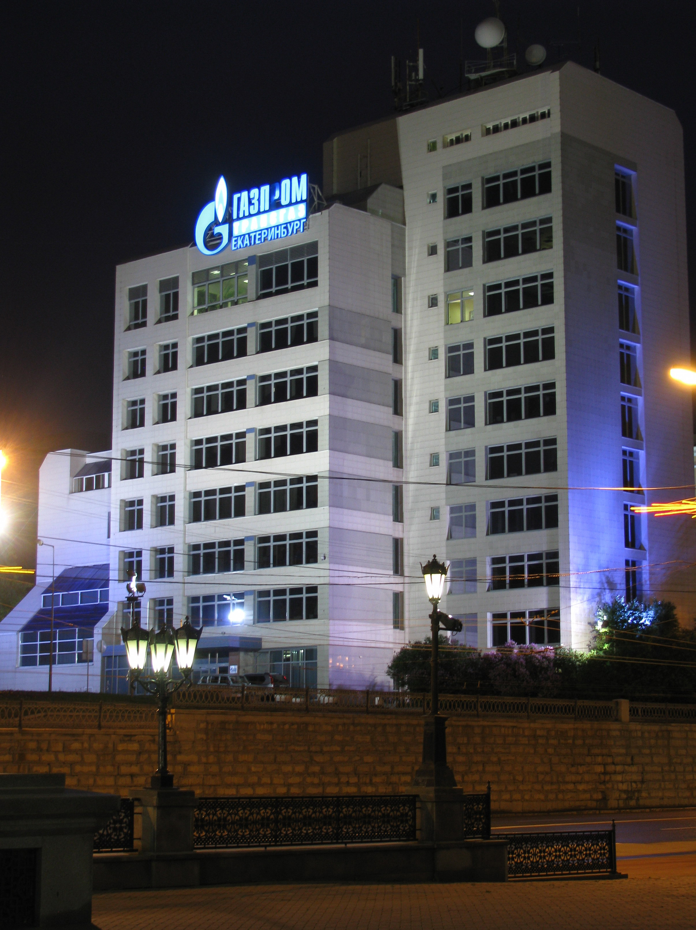 Офис компании "Газпромтрансгаз-Екатеринбург"